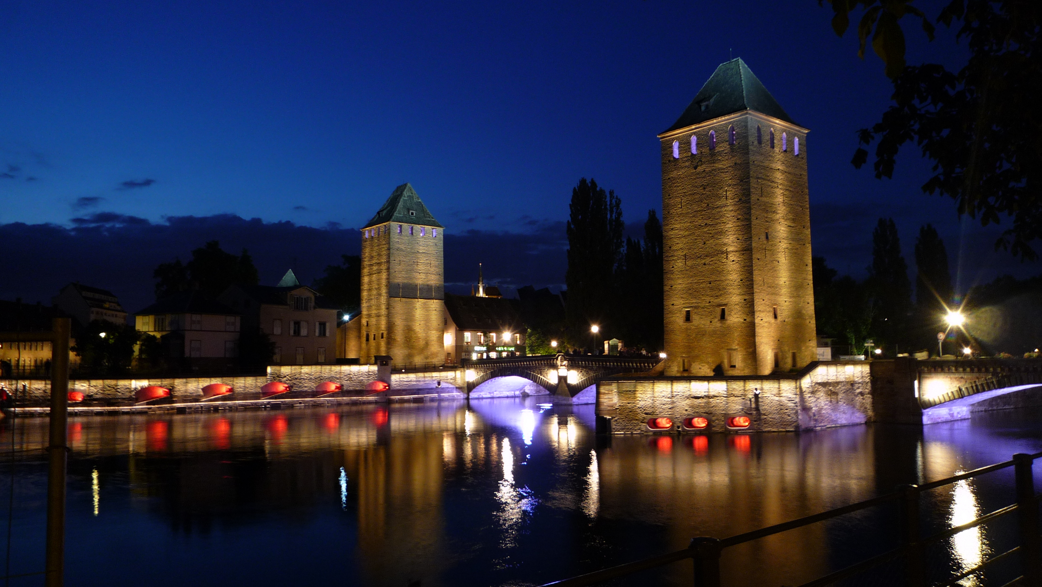 Strasbourg Les Ponts couverts